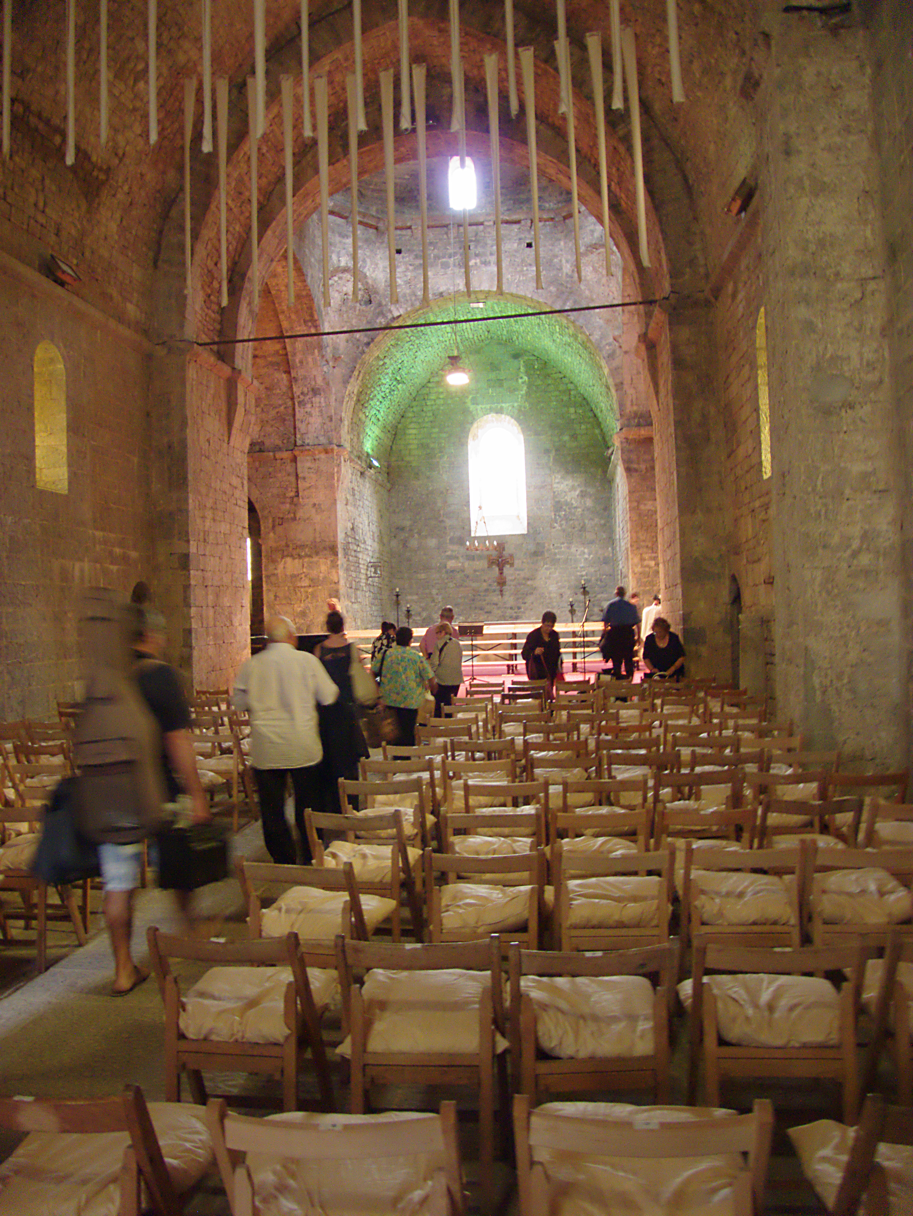 Vista interior de la nau del monestir Sant Pere, Camprodon (Ripollès, Girona, Catalunya, Espanya)